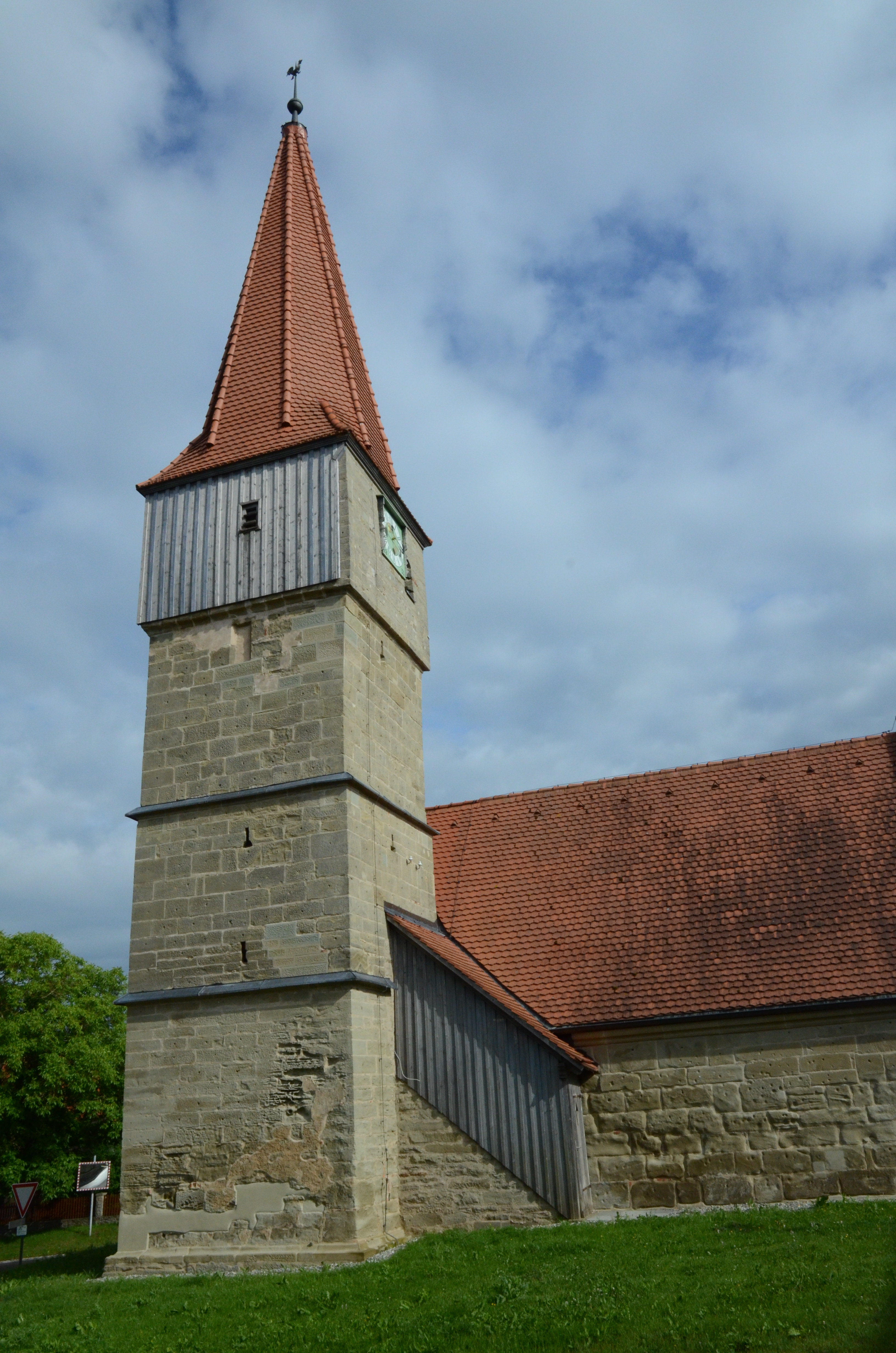 evang.-luth. Kapelle St. Stephanus in Ergersheim